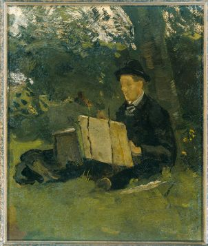 Jan Verkade (1868-1946) schilderend onder een boom (1891)